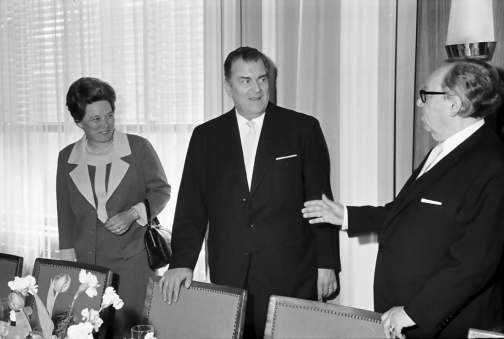 Freiburg: Colombi Hotel; Staatssekretär Paul Vohwinkel überreicht Bundesverdienstkreuz 1. Klasse für Erich Pfisterer vom Schluchseewerk